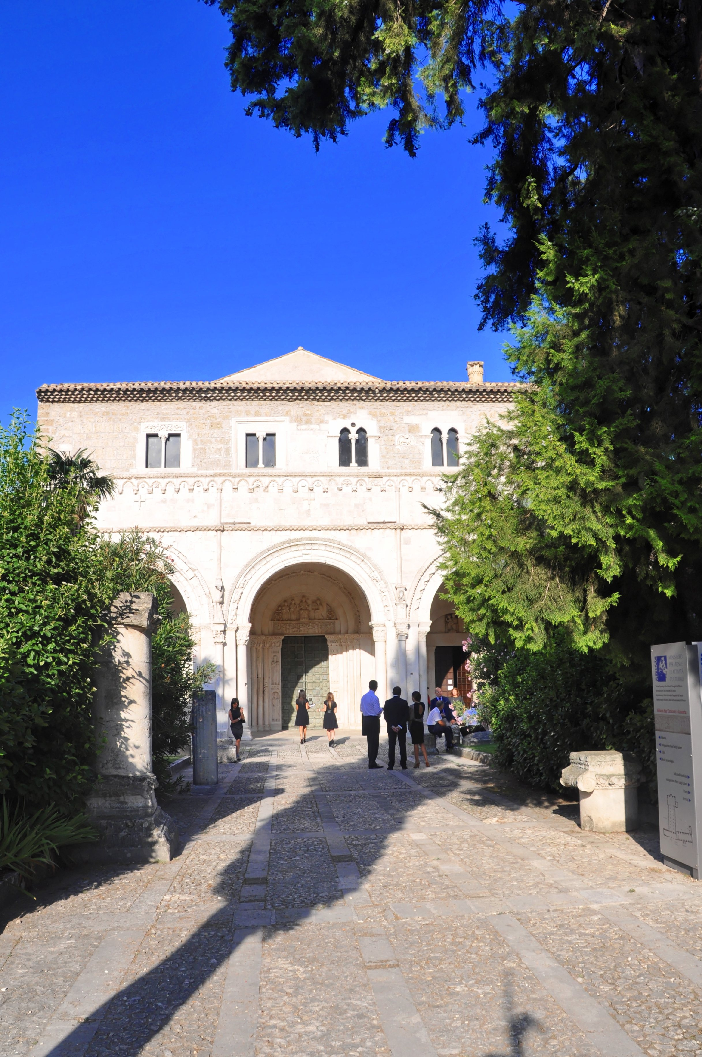 Abbazia di San Clemente a Casauria 2013